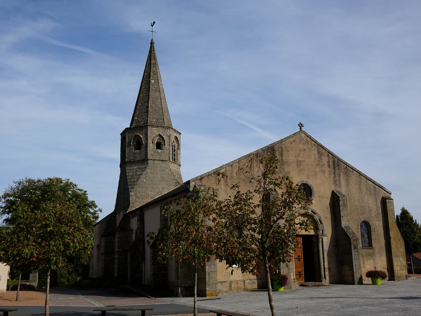 Église Saint-Priest